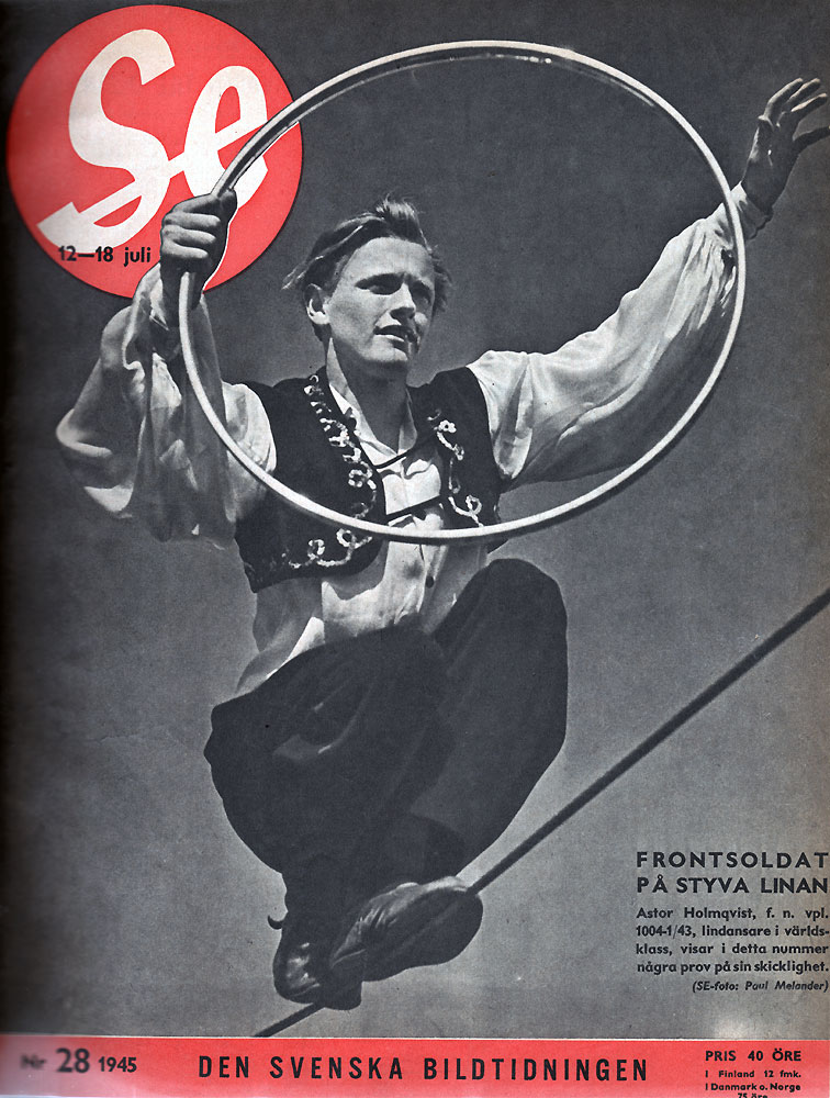 Astor Holmqvist